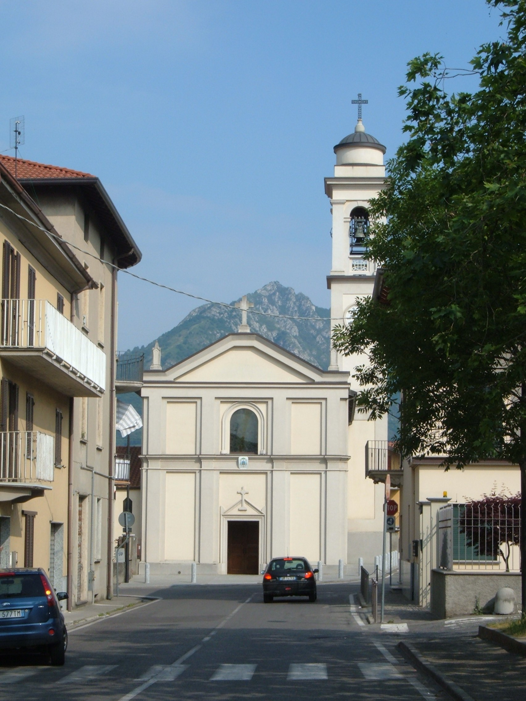 Chiesa della Sacra Famiglia al Pascolo (frazione di Calolziocorte).